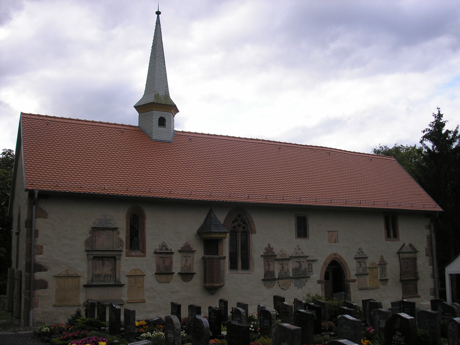 Die Gangolfkapelle am Friedhof von Geisa (Thüringen).